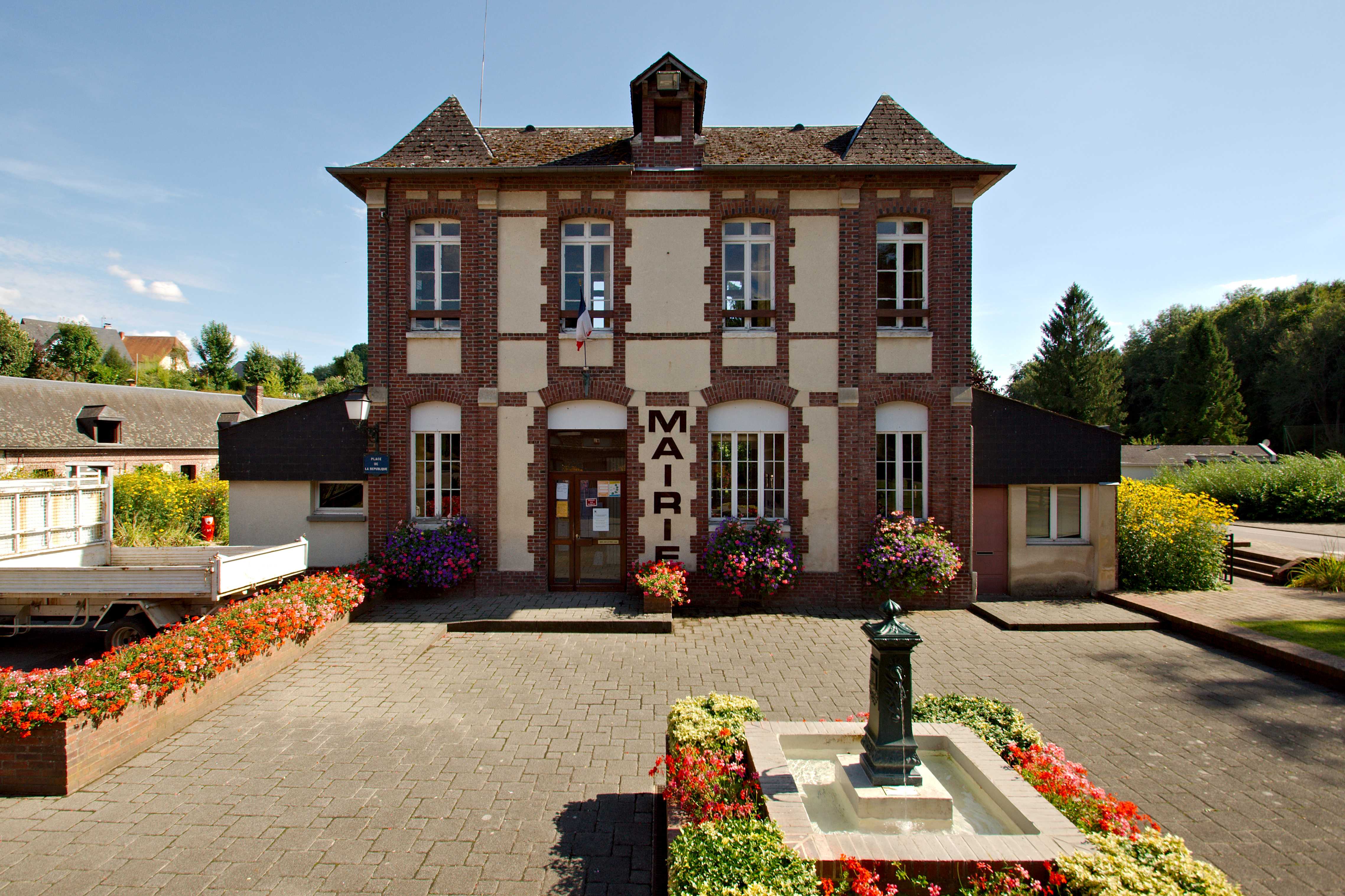 Mairie de Fontaine-sous-Préaux, route des Sources